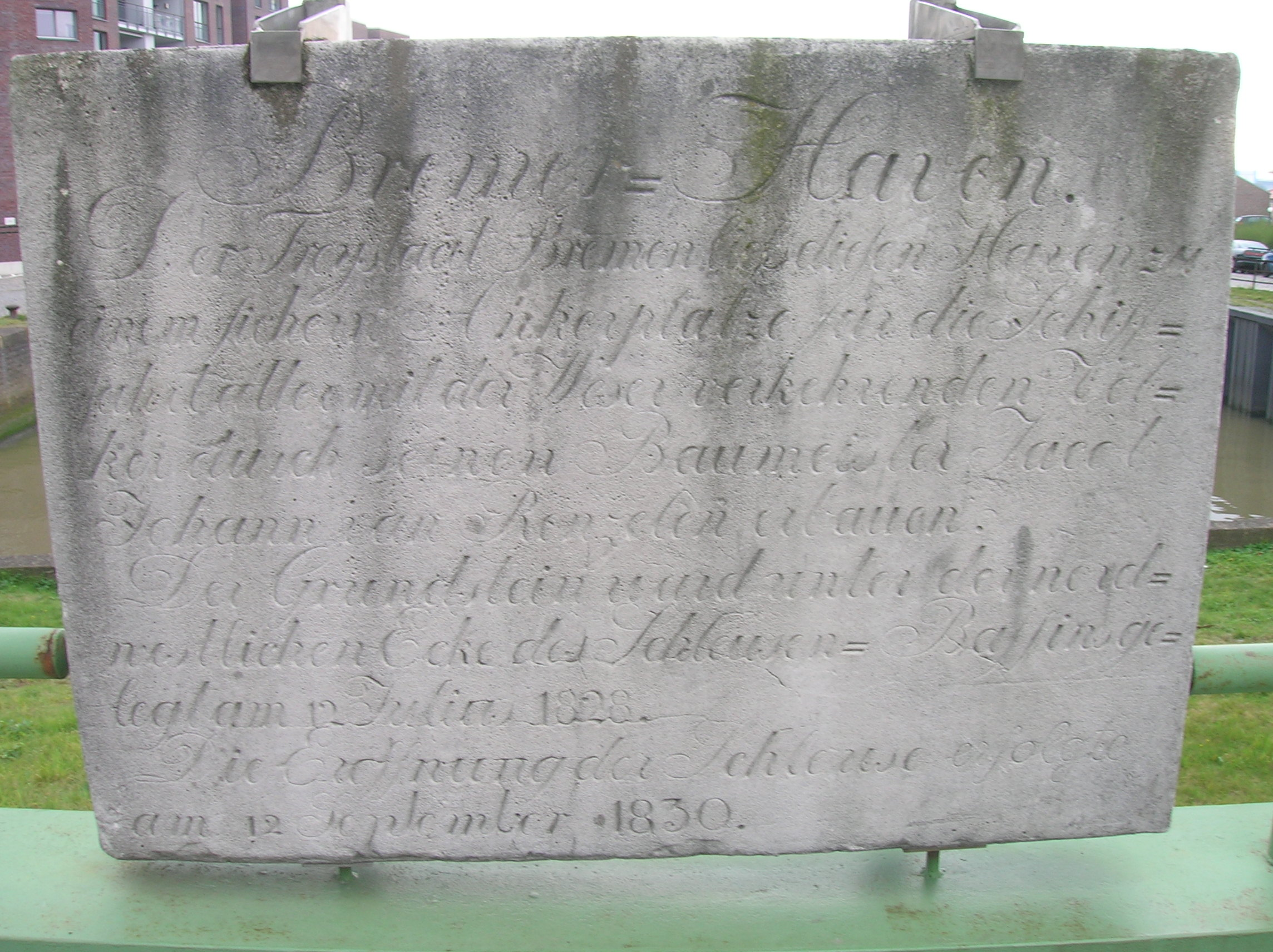 Nachbildung einer Gedenktafel an der früheren Zufahrt zum Alten Hafen (Bremerhaven) zur Erinnerung an den Bau durch Bremen.